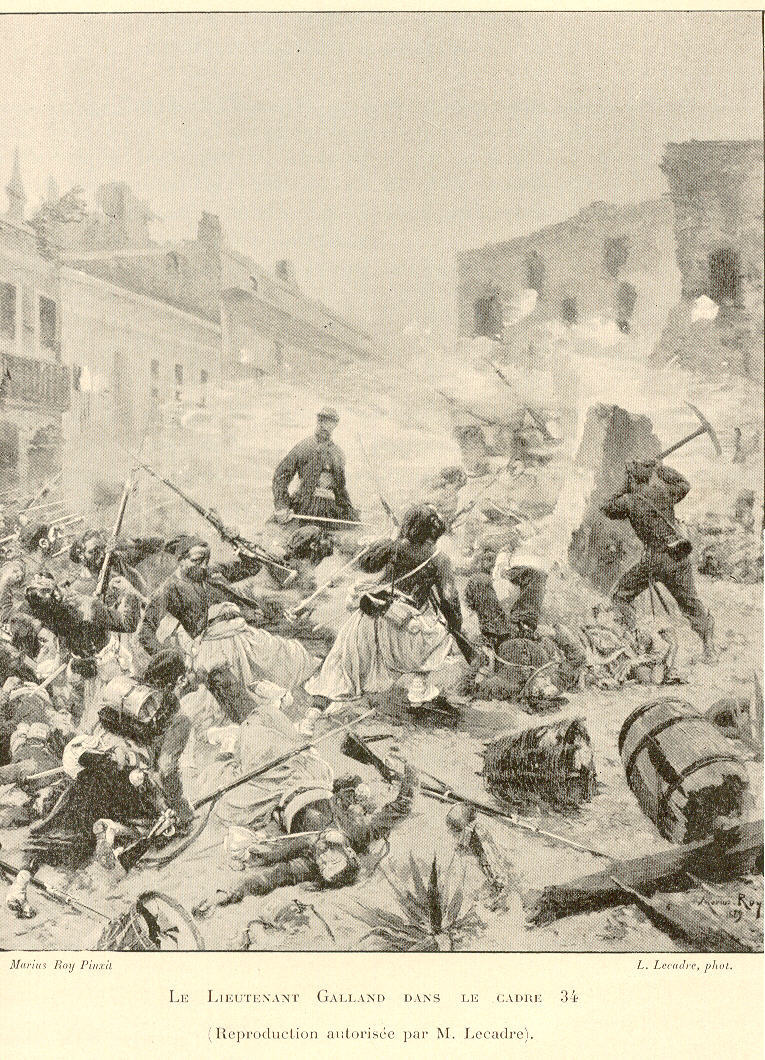 Slag bij Puebla, van public domain (ouderdom+"reproduction autorisée")